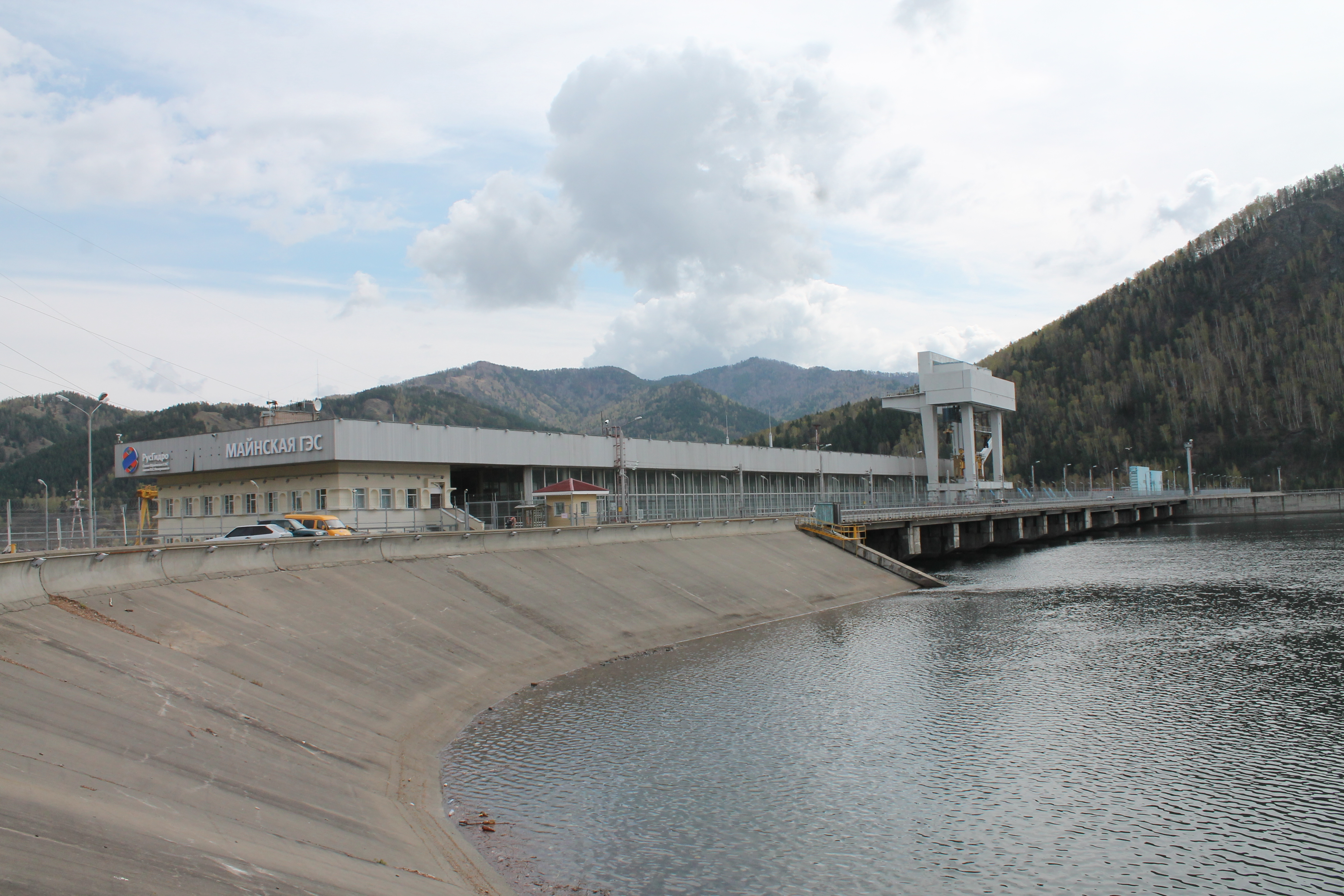 Майнская ГЭС с верхнего бьефа